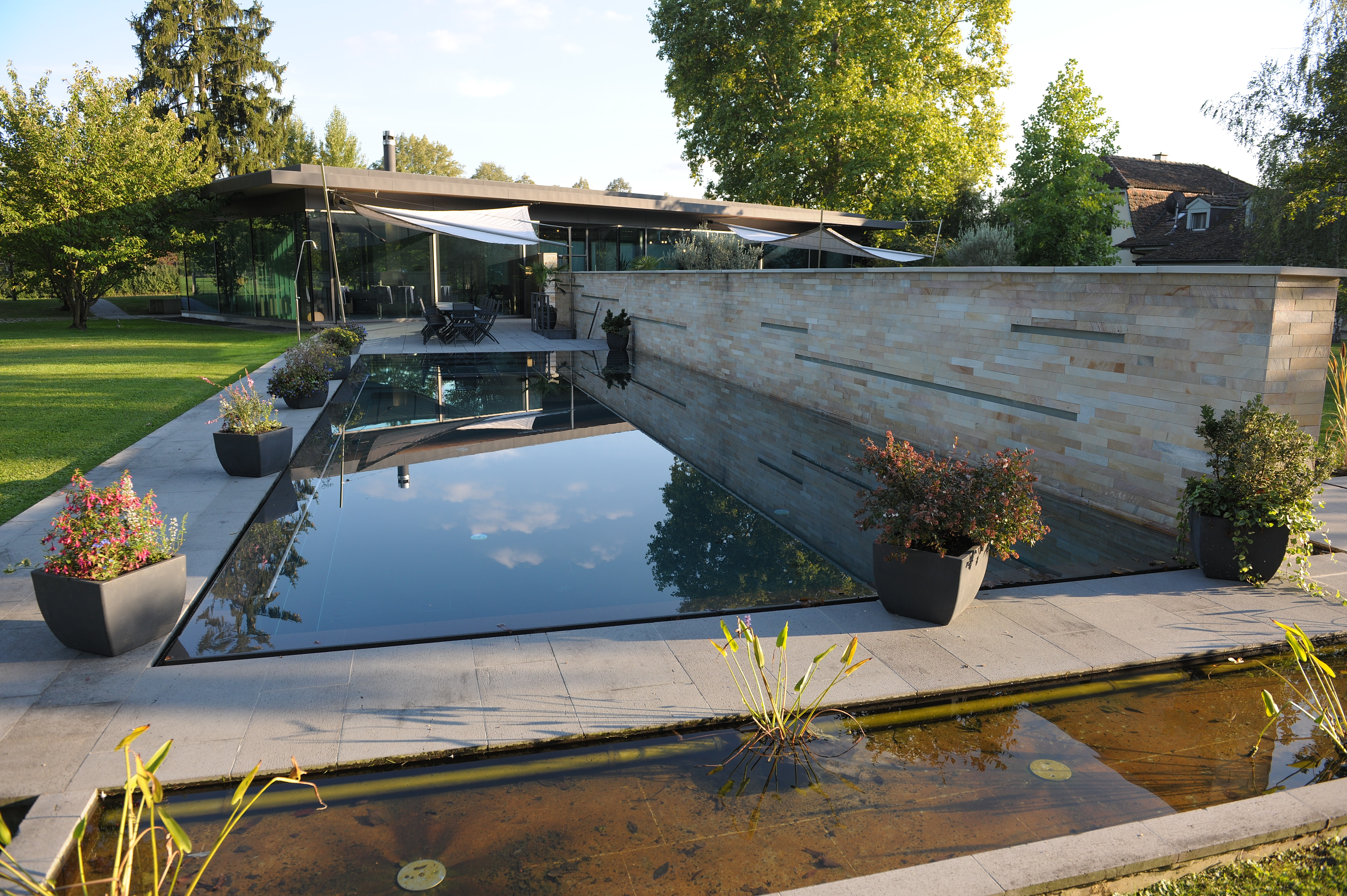 Der Hirzen Pavillon (Gauer Itten Messerli Architekten AG) auf dem Bäumlihofgut in Riehen (Schweiz) vom Schwimmbad aus gesehen